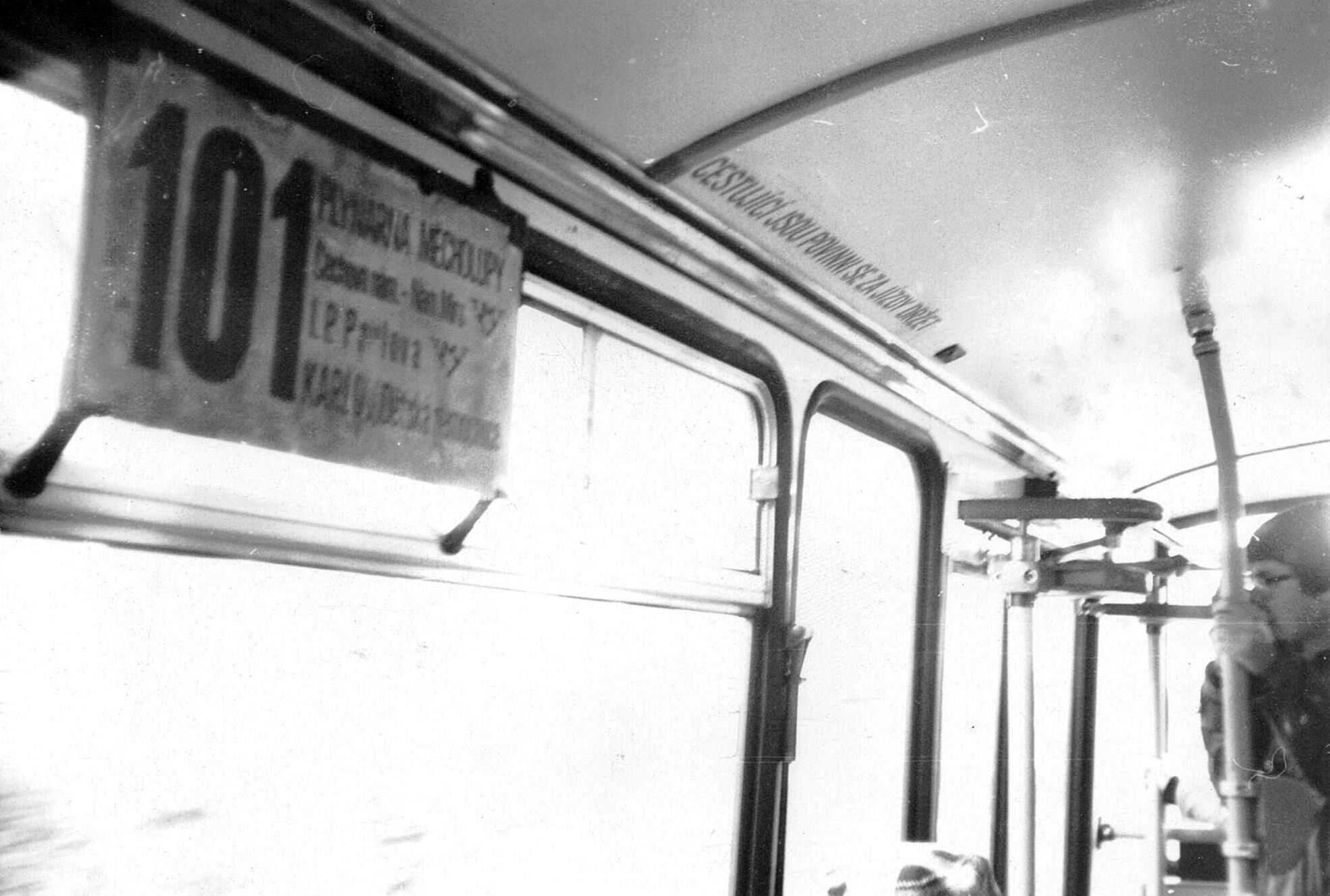 Praha, Záběhlice, vnitřek nového autobusu Karosa B 731 na lince 101.